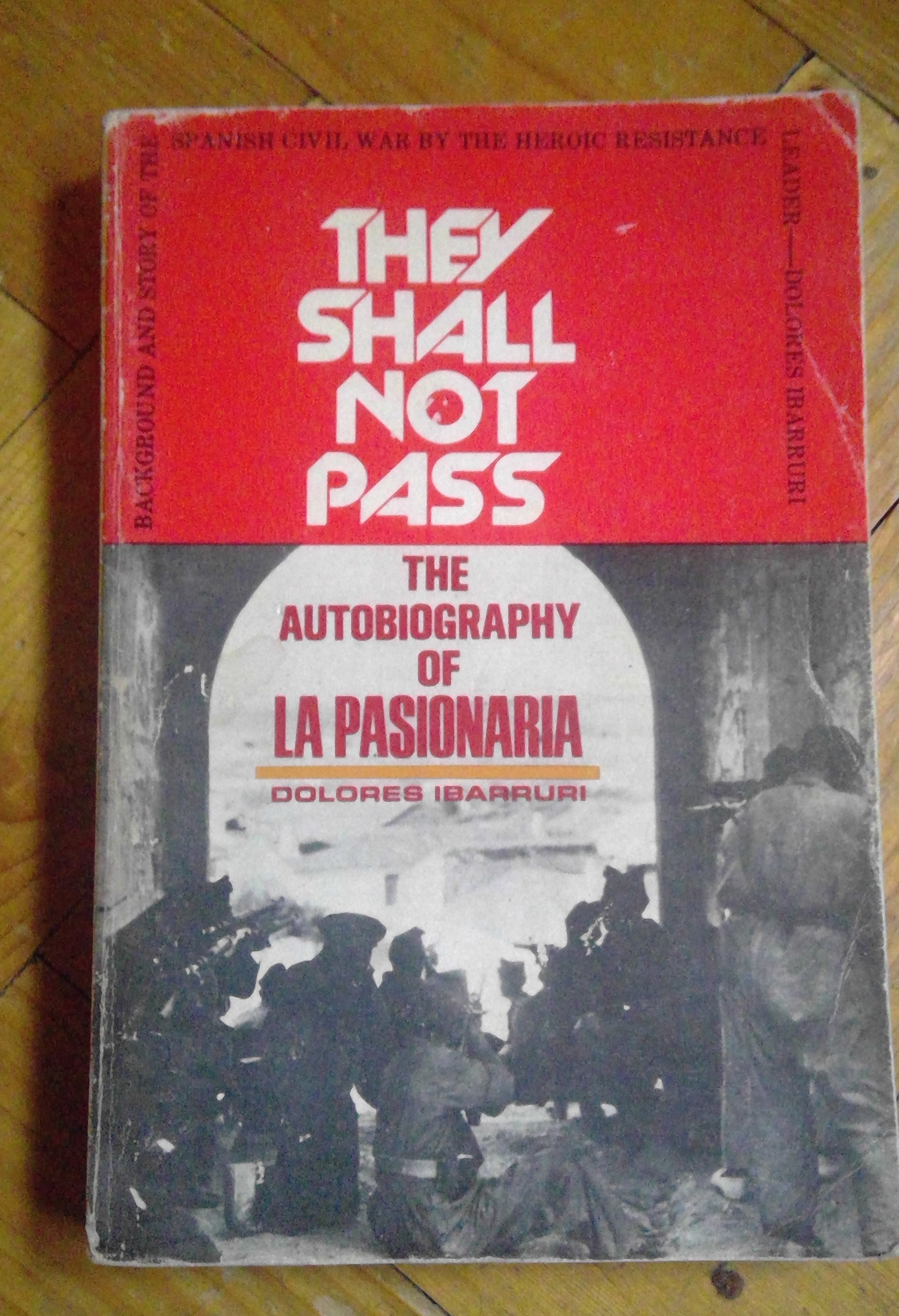 Cyhoeddwyd yn gyntaf yn 1966